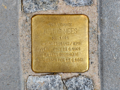 Stolperstein Offenbacher Landstr 9